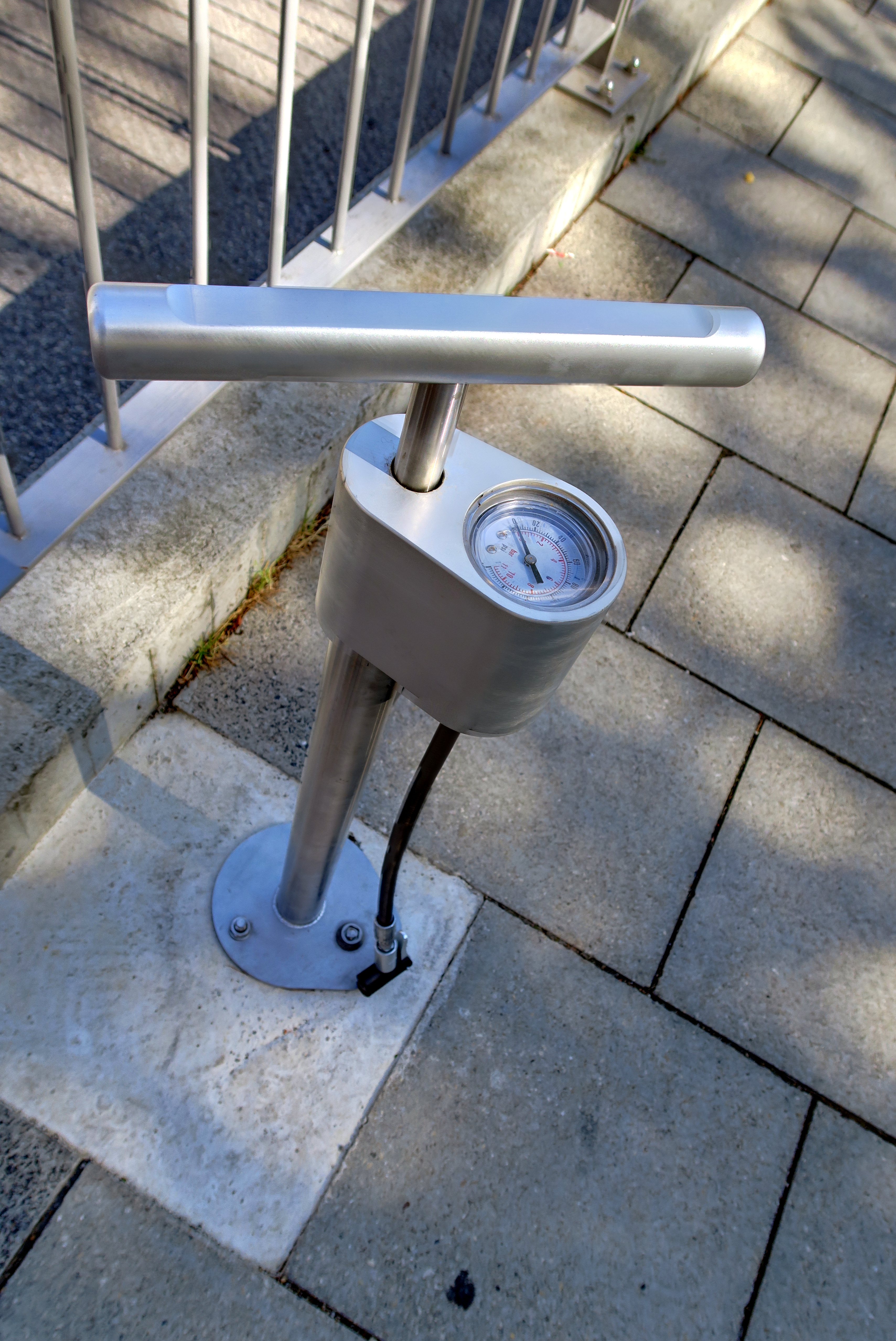 Deutschland, Bayern, Gröbenzell, Stationäre Fahrradpumpe mit Manometer an der S-Bahn-Station Gröbenzell, installiert im Sommer 2015